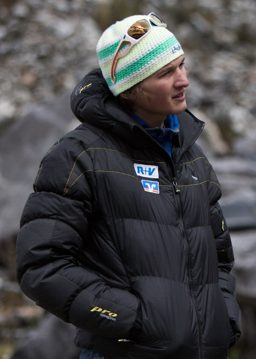 Michael Wohlleben November 2012